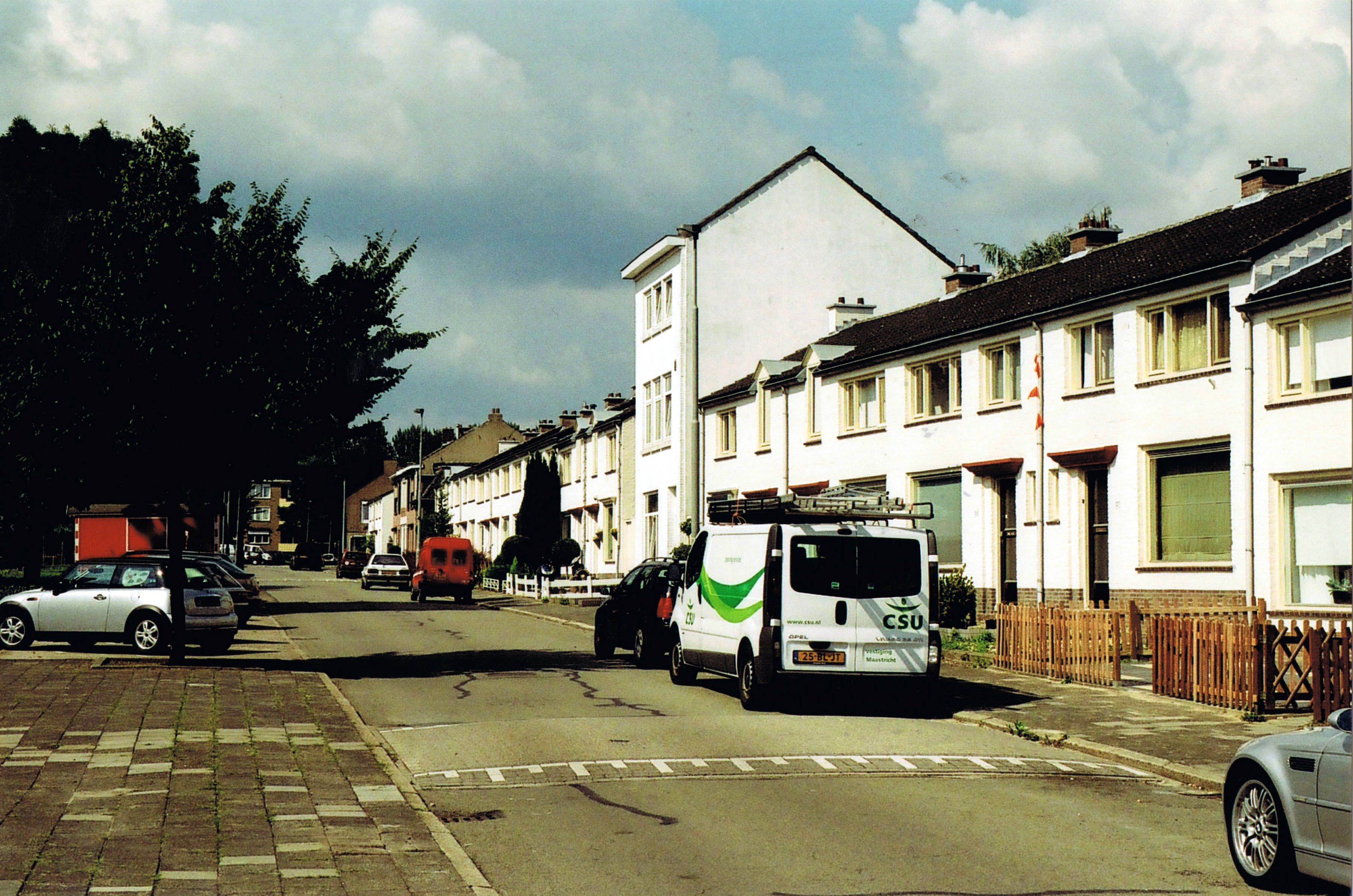 Maastricht 2007 Henri Jonaslaan Maastricht.